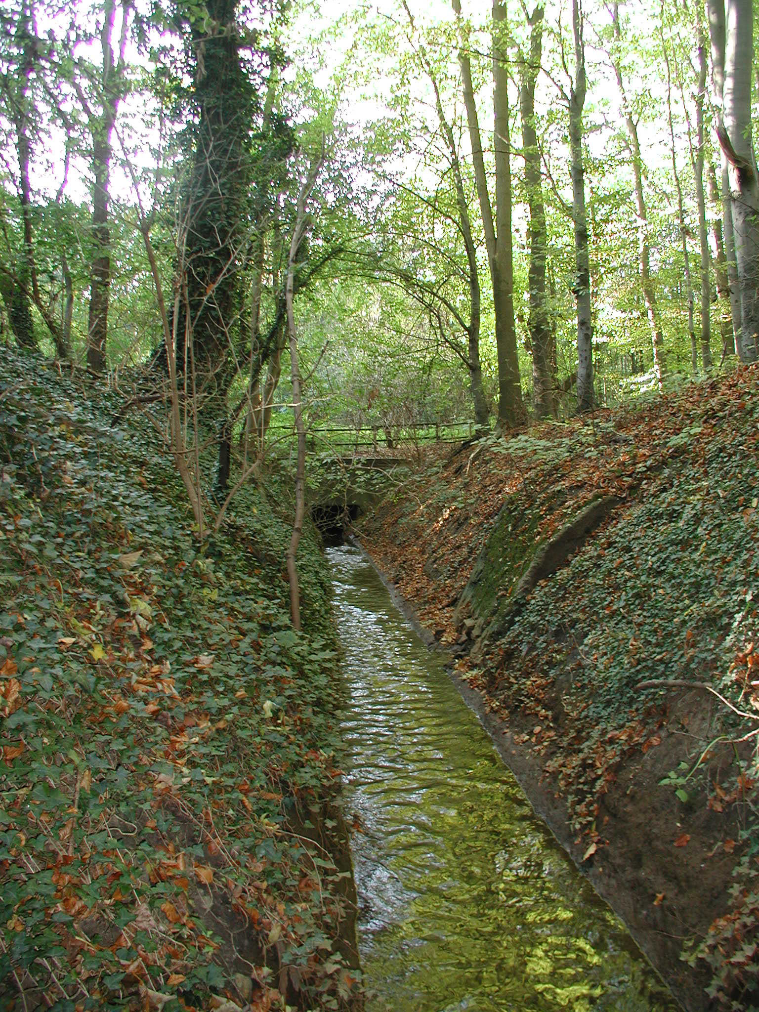 Hürth-Efferen, der kanalisierte Duffesbach (Ortsausgang)